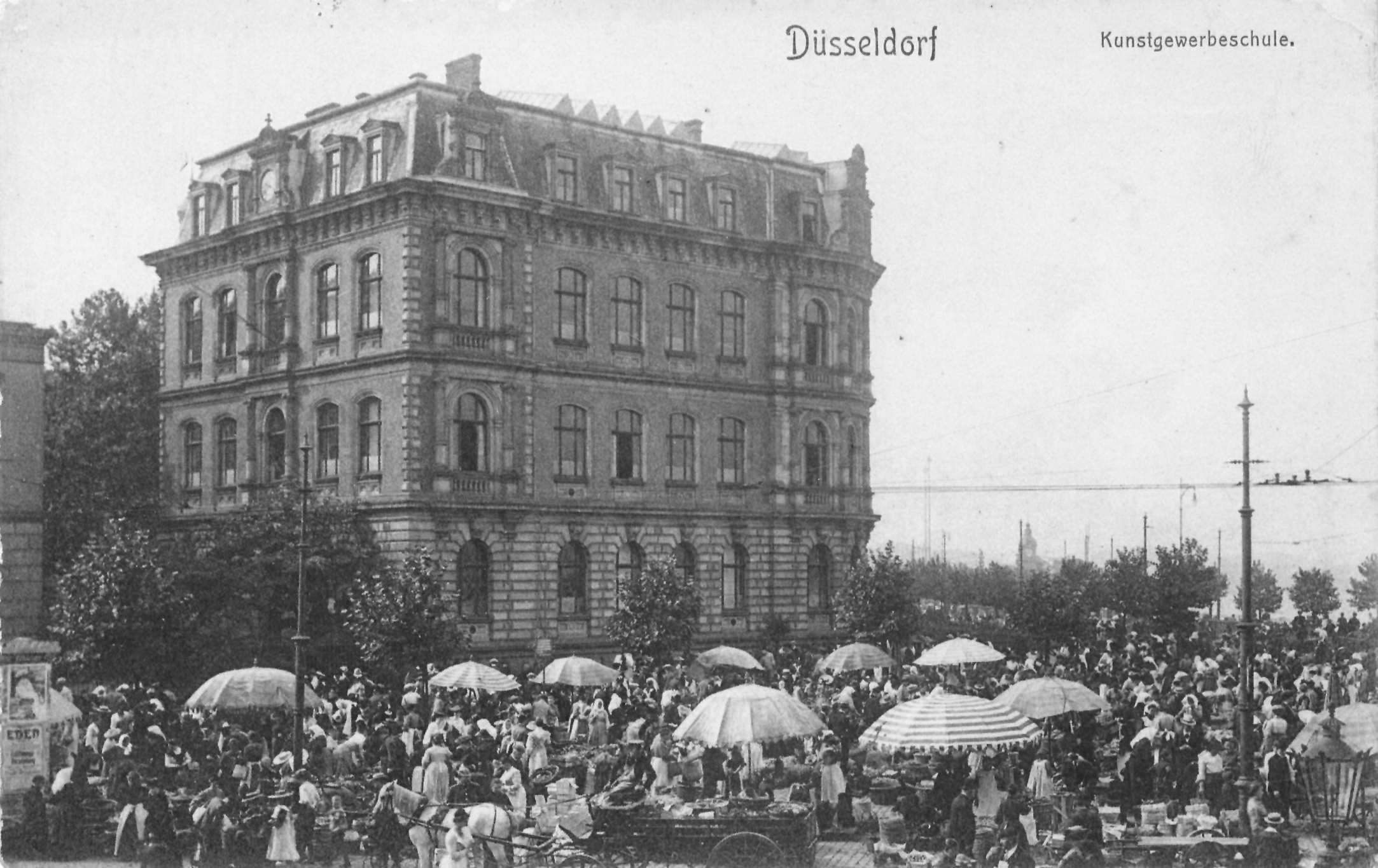 Kunstgewerbeschule am Burgplatz in Düsseldorf, Postkarte von W. Wörmbeke (Inh. Wörmbeke & Betcke), um 1900